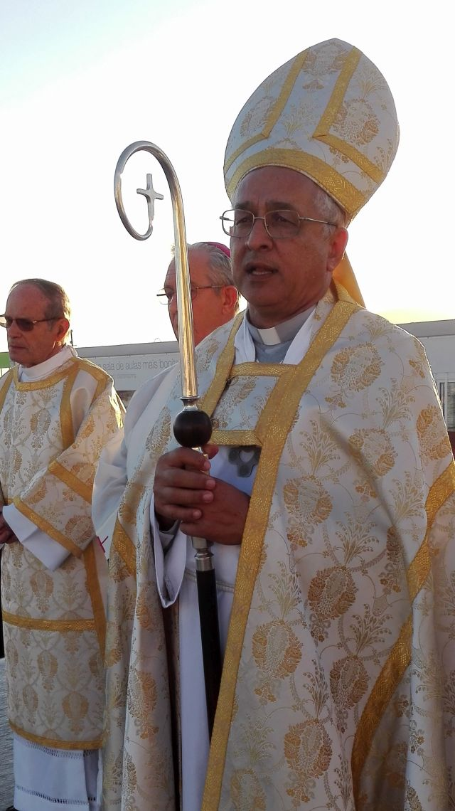 D. José Ornelas Carvalho preside ao Encerramento da Visita da Imagem Peregrina de Nossa Senhora de Fátima à Diocese de Setúbal, a 8 de novembro de 2015